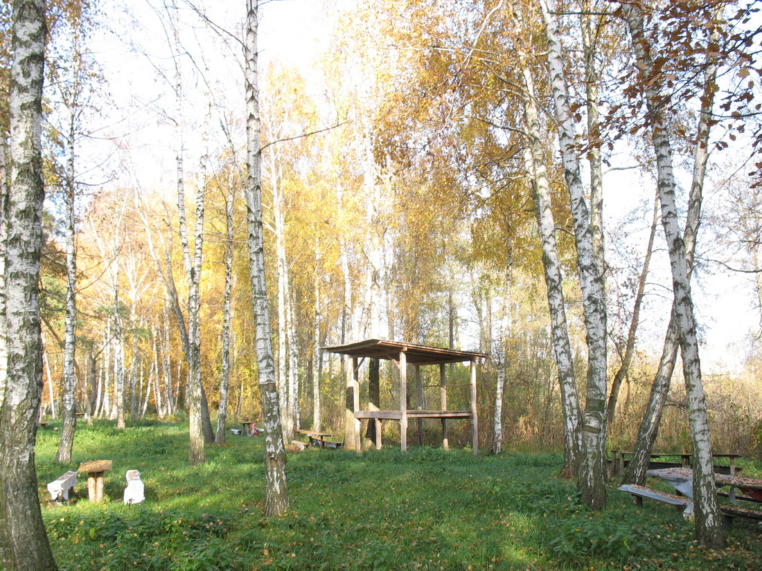 Чернігівська обл., Менський р-н, с. Киселівка. Центр села. Острів в урочищі "Рокитне"